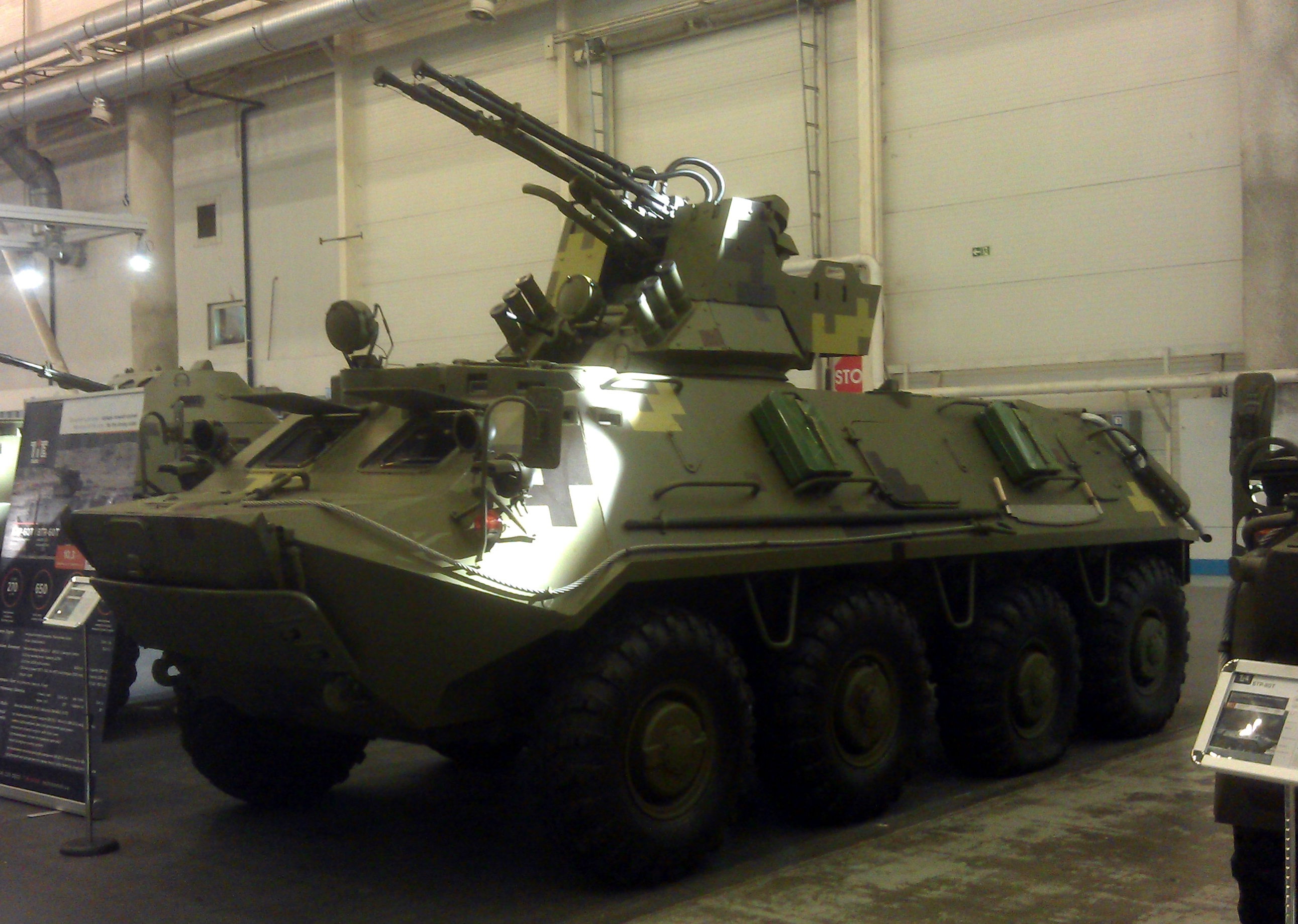 Бронетранспортёр БТР-60Т БАУ-23х2 на стенде компании Техимпекс. Выставка "Зброя та безпека", Киев, октябрь 2017 г.